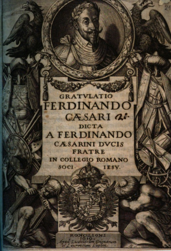 Frontespizio dell'edizione a stampa dell'orazione "Gratulatio Ferdinando Cæsari dicta a Ferdinando Cæsarini" (1619)